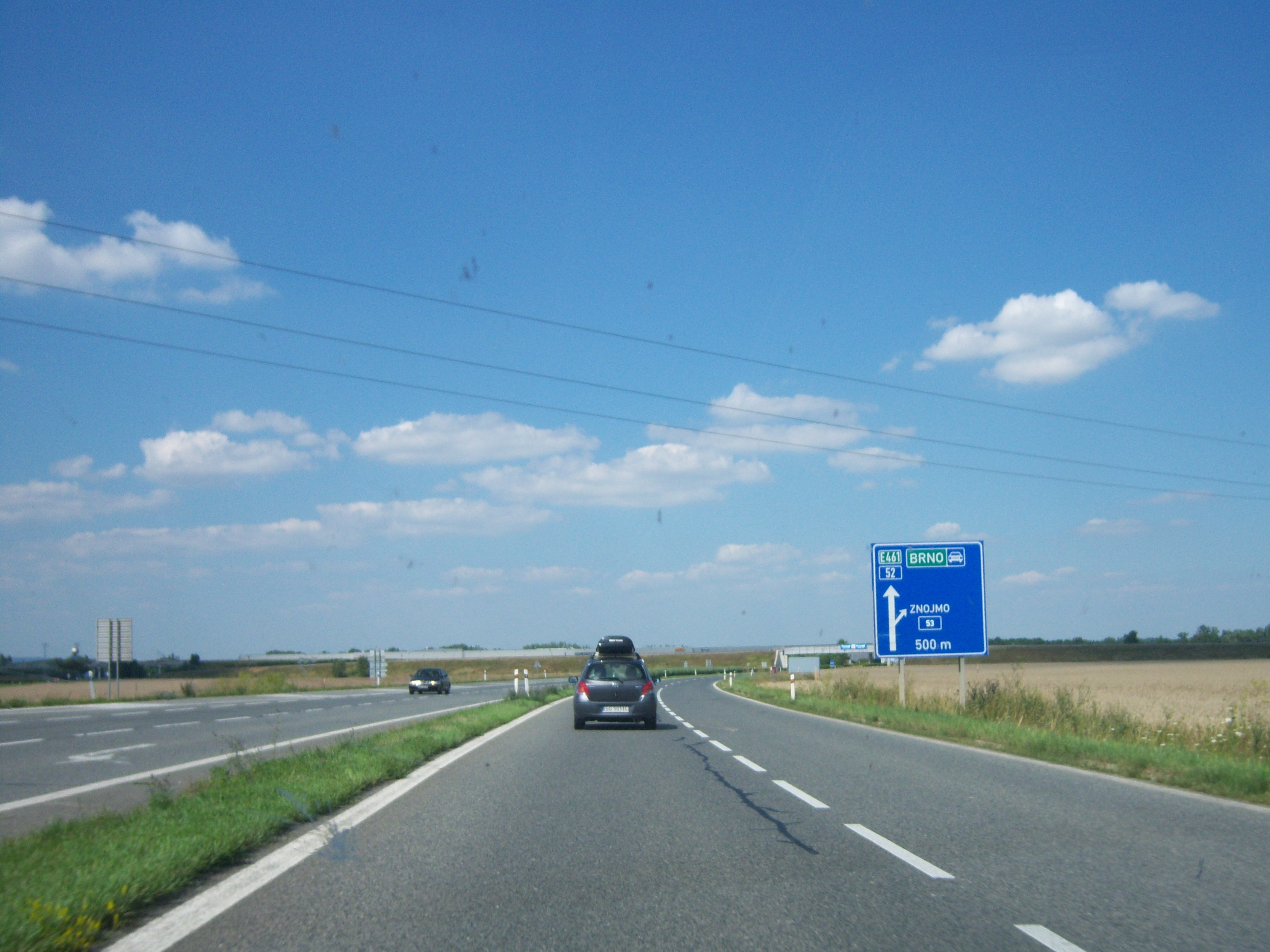 Beginn der Rychlostní silnice 52 [E461] bei Pohořelice Richtung Brno